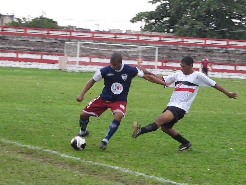 Uniforme reserva do Rubro Social, em 2009. Foto de Paulo Roberto Rodrigues.